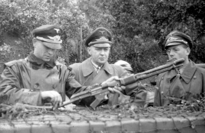 San Felice (Monte Circeo).- Besichtigung des Abschnitt Süd durch KG [kommandierenden General]